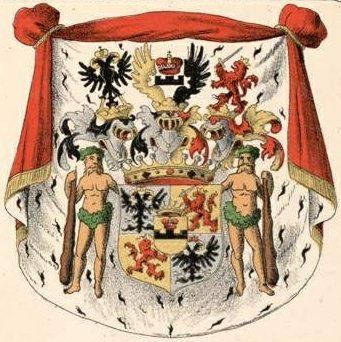 Löwenwolde suguvõsa krahvivapp